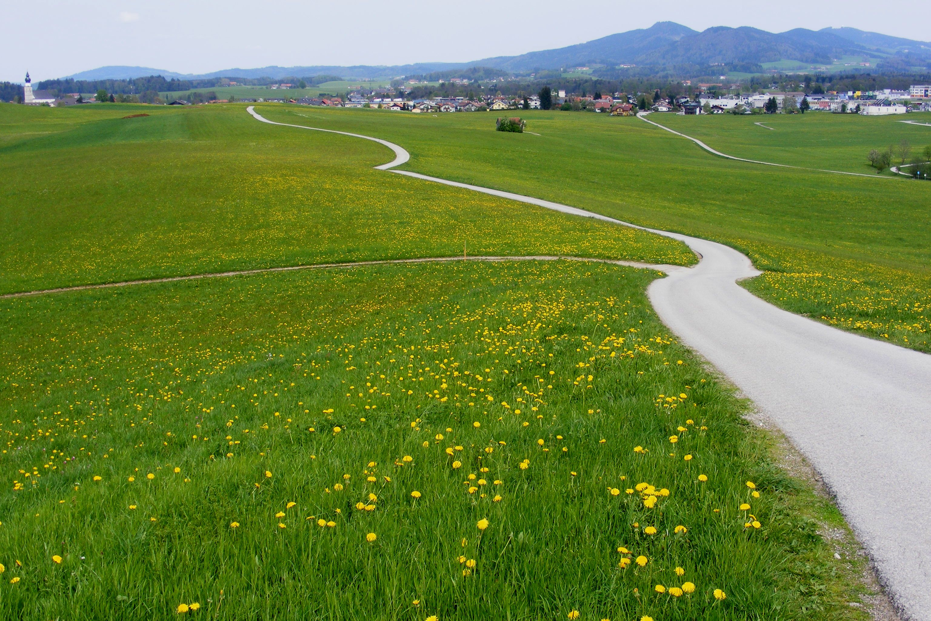 Blick Richtung Eugendorf (südlicher Teil mit Gewerbegebiet)